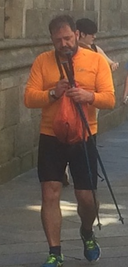 O alcalde de Ponteceso, García Carballido, tentando entregar a súa carta no Pazo de Raxoi ante a mirada de Leiceaga.